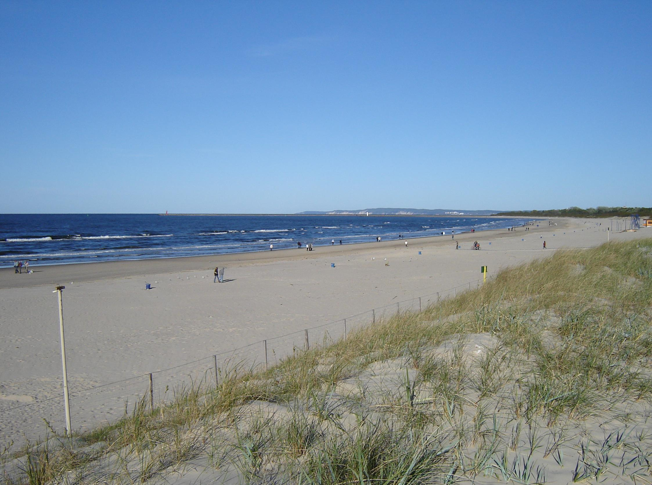 Plaża w Świnoujściu.